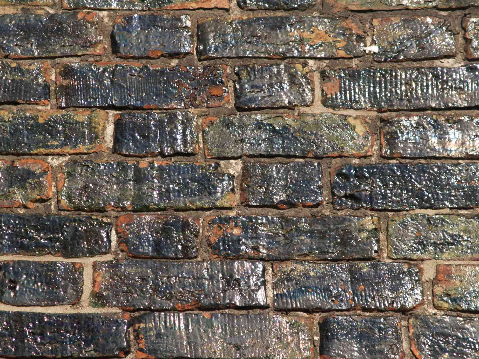 die grün glasierten (alten) Ziegel